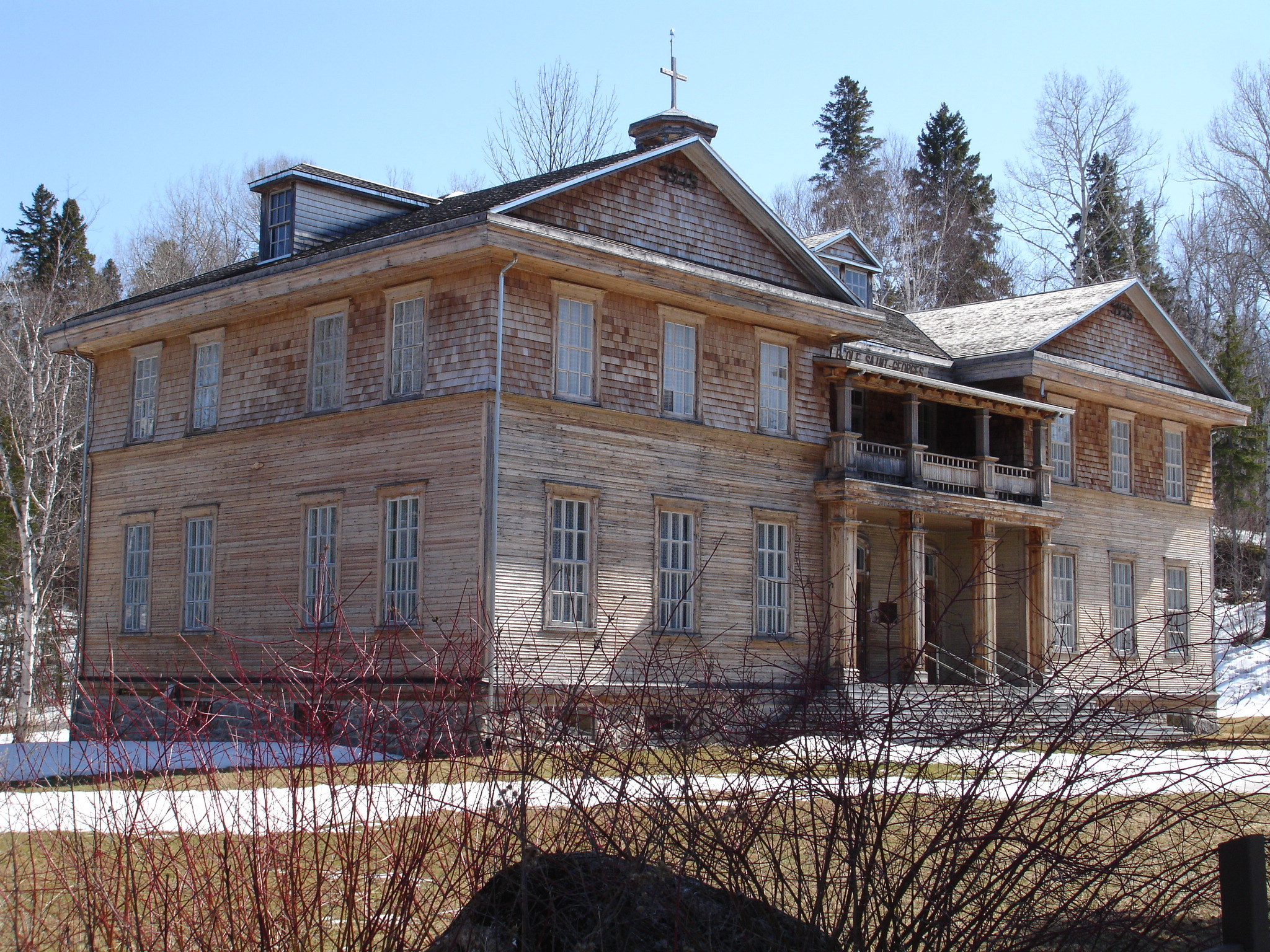 Le couvent-école Saint-George de Val-Jalbert